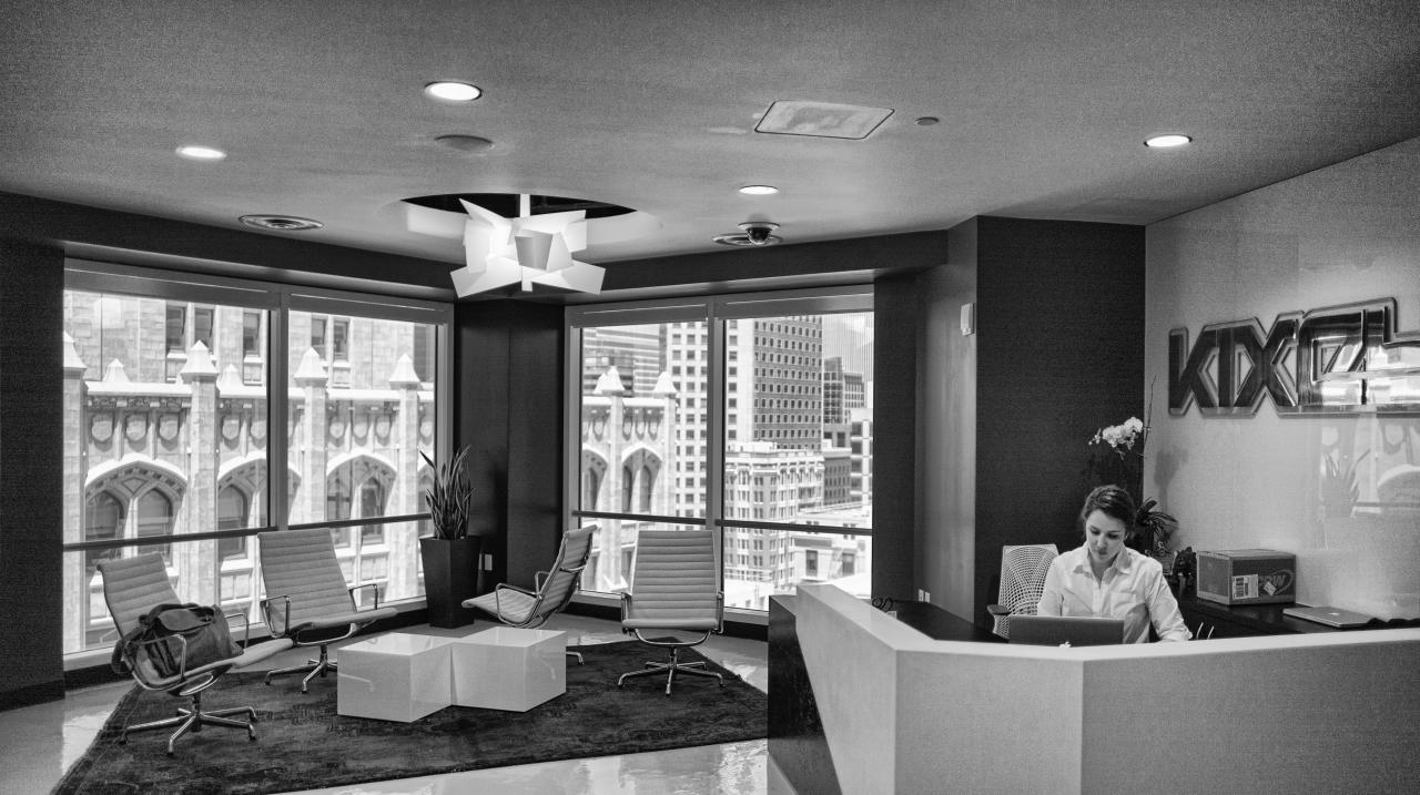 kixeye